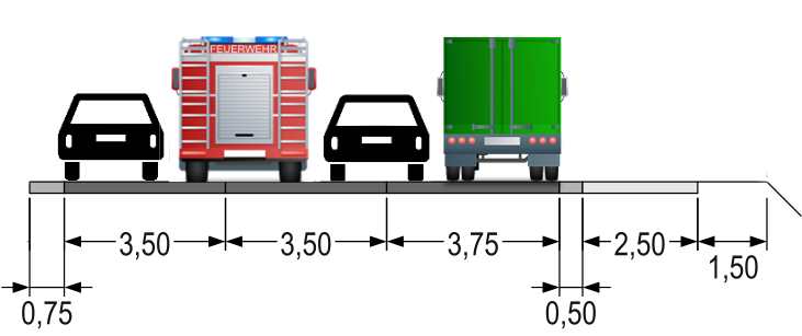 Rettungsgasse mit Fahrstreifenbreiten